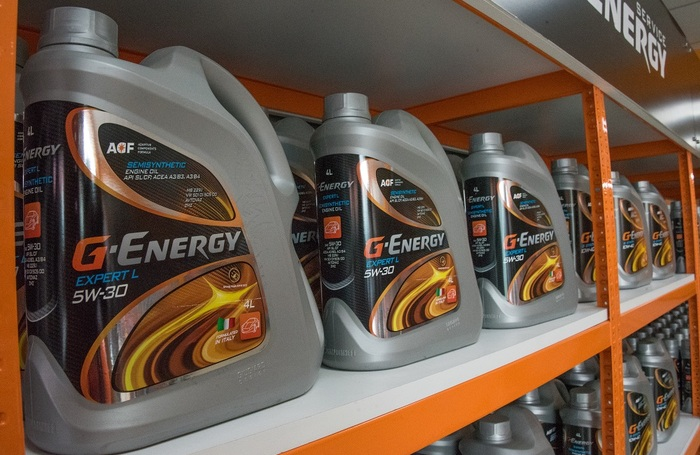 Фото с официального сайта ООО "Газпромнефть - Смазочные материалы", иллюстрирующее деятельность компании.